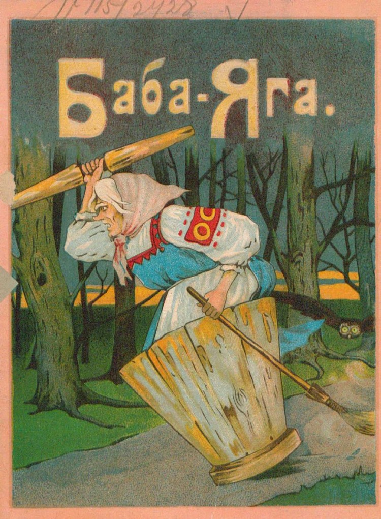 Баба-яга. Обложка книги издательства И. Д. Сытина